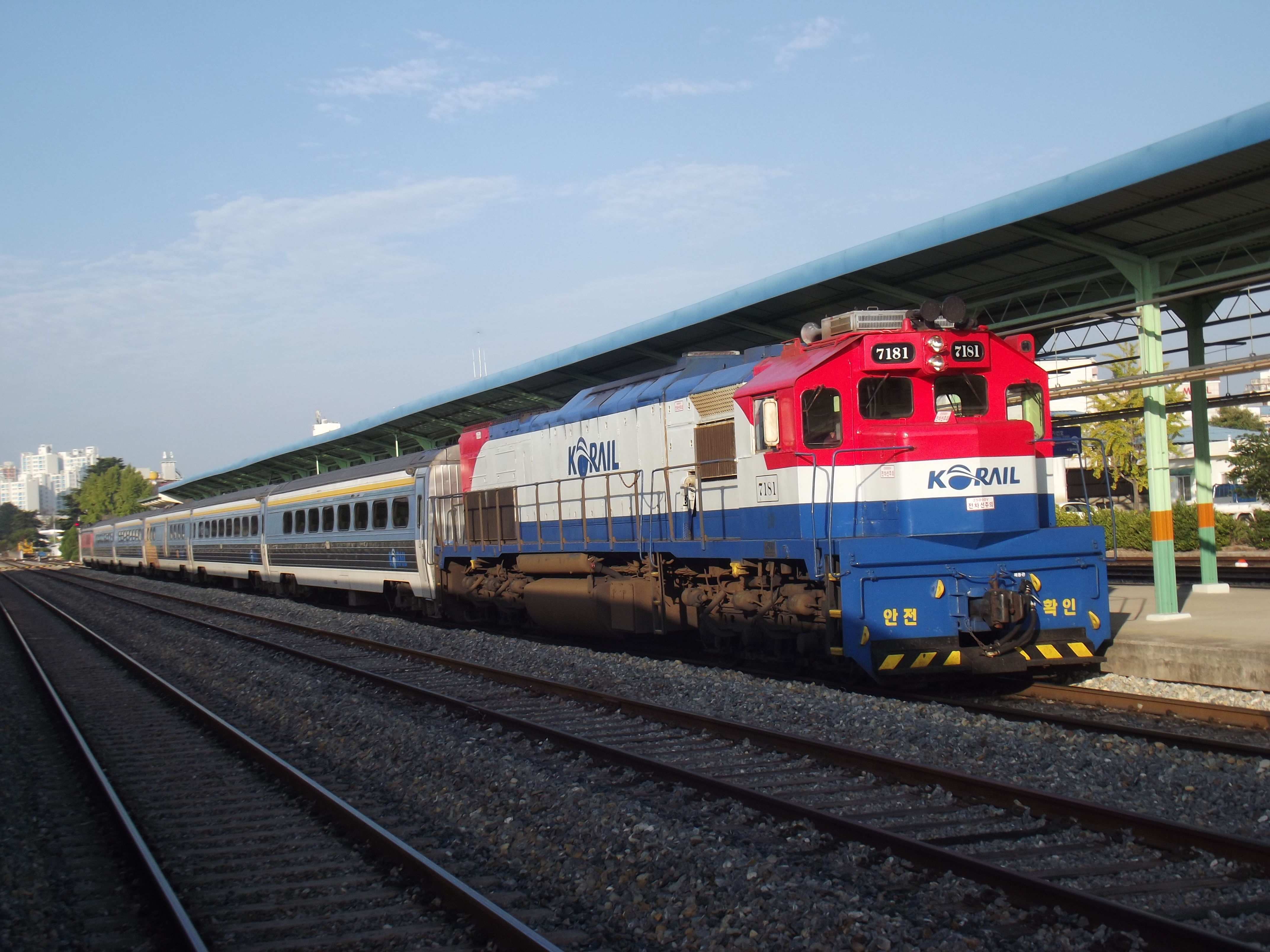 Trein in Andong station